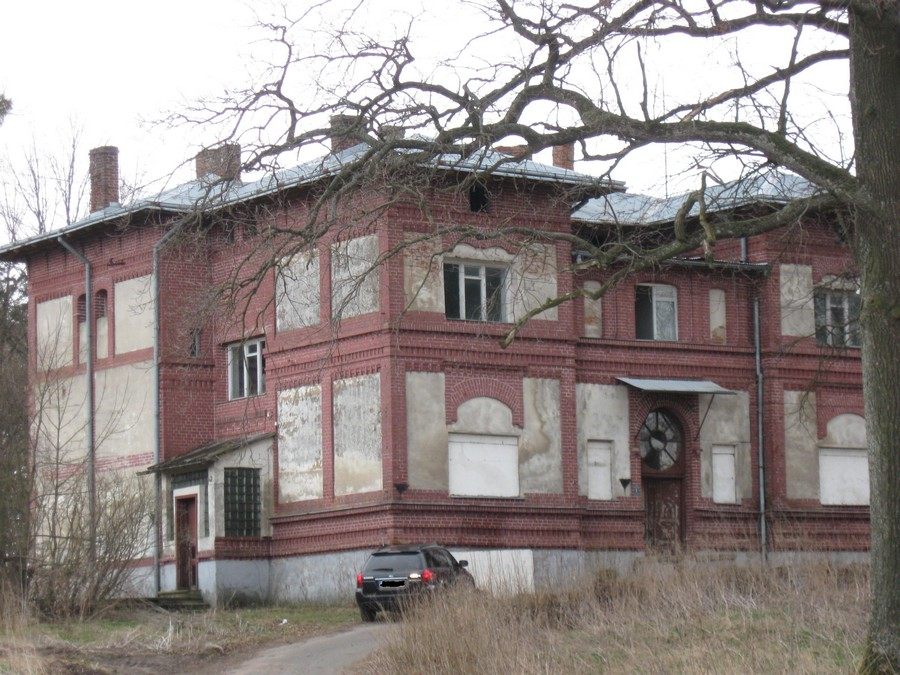 Girgajny, pałac